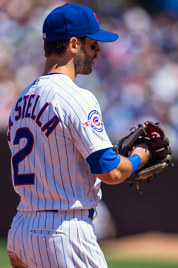 Tommy La Stella